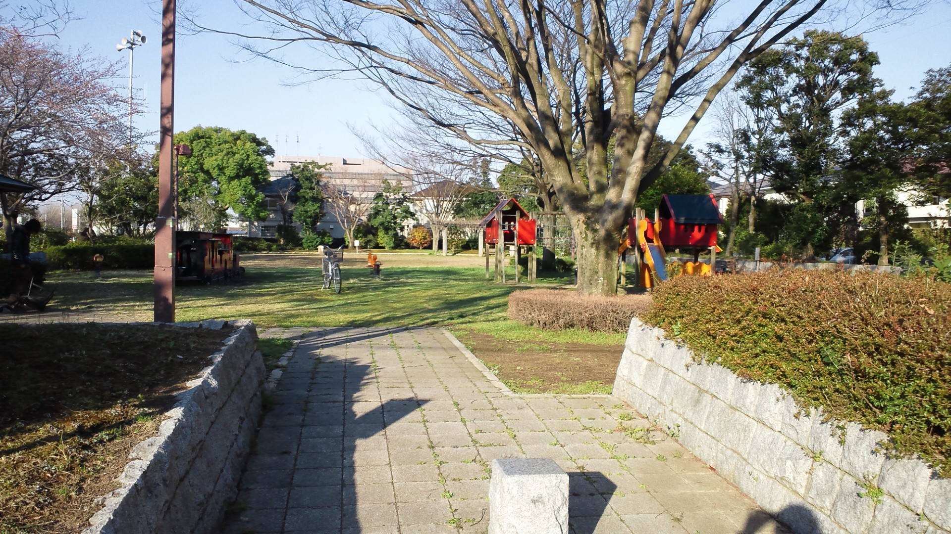 土浦市西根西